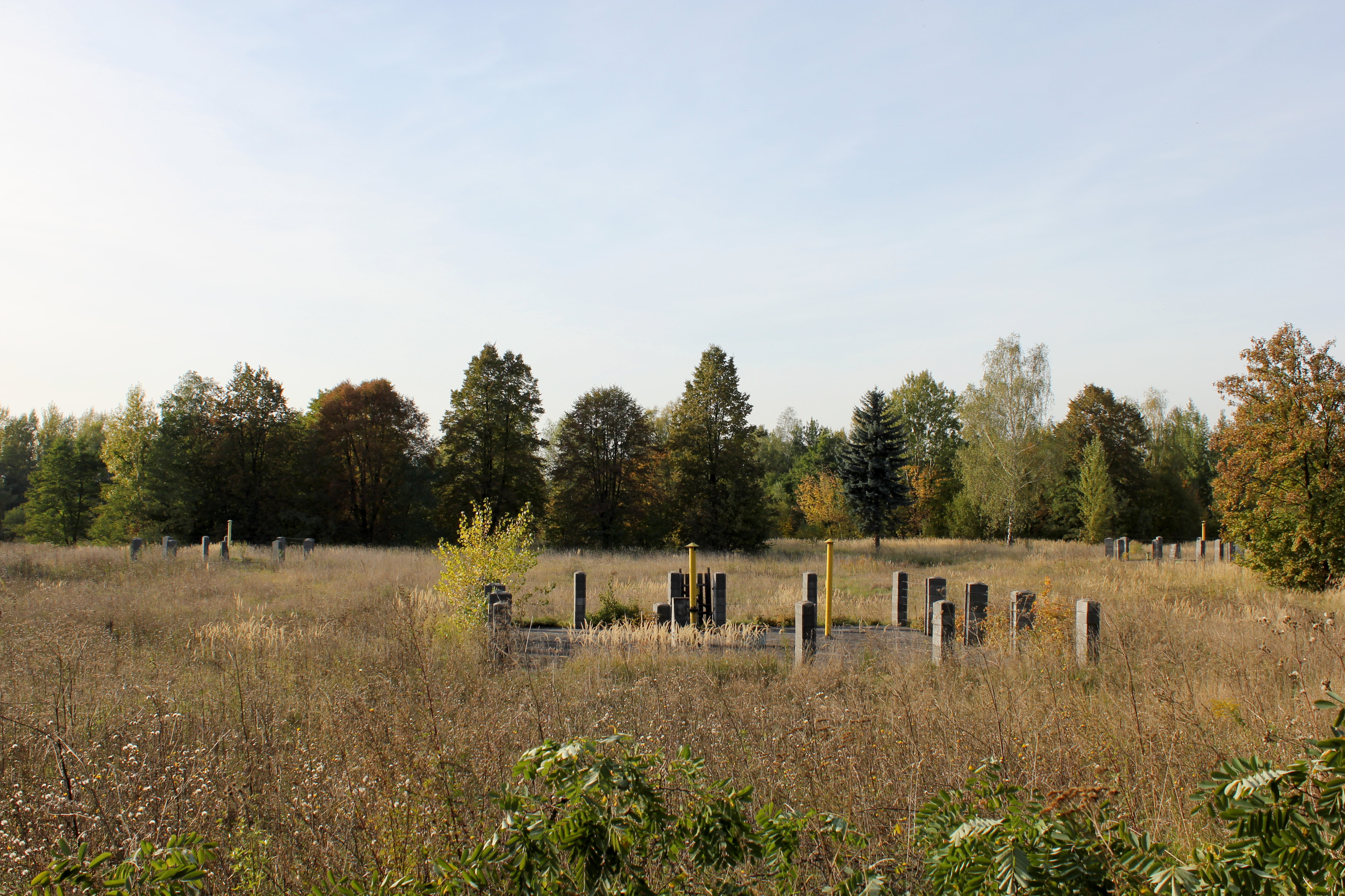 Dnešní bývalý důl Jindřich, Karviná-Doly.